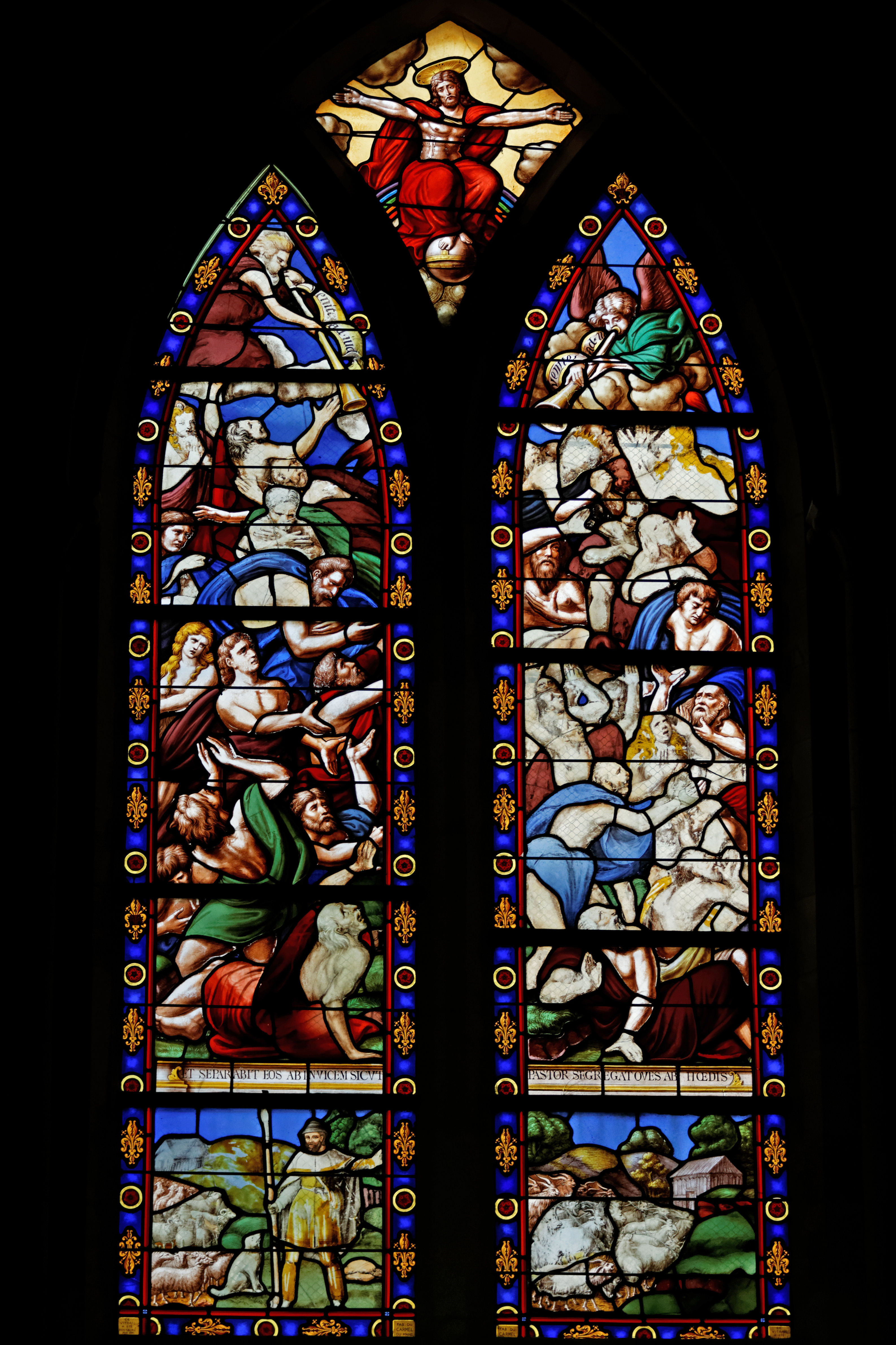 Le Jugement Dernier, vitrail du XVIe siècle de la cathédrale Saint-Paul-Aurélien de Saint-Pol-de-Léon.